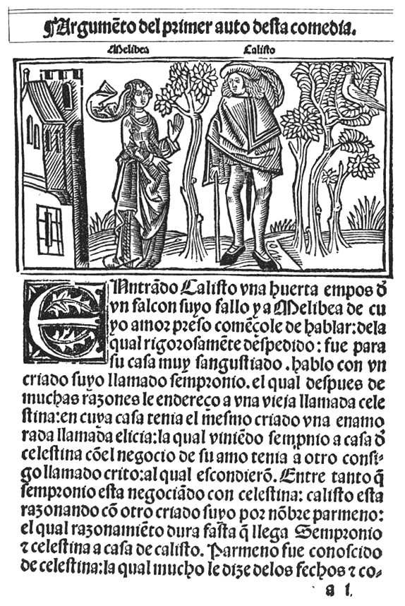 Primera edición de Fernando de Rojas, “Comedia de Calisto y Melibea”, Fadrique Alemán de Basilea, Burgos, 1499.